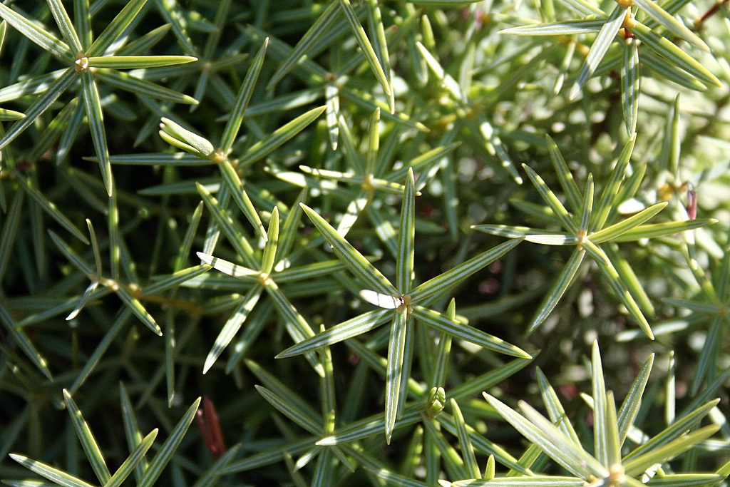 Juniperus oxycedrus foliage detail, Valencia, Spain